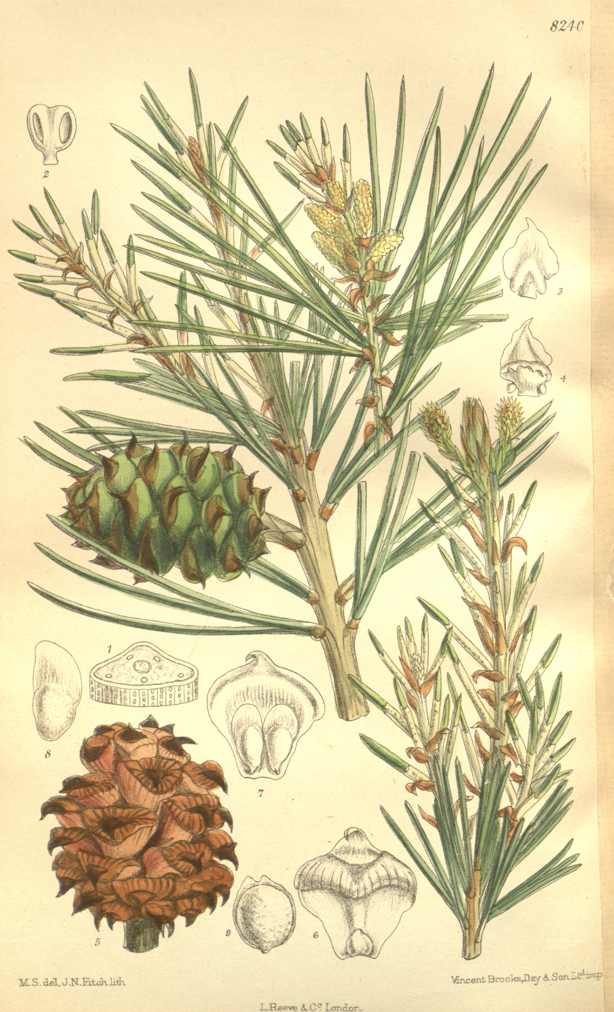 Pinus bungeana, Pinaceae